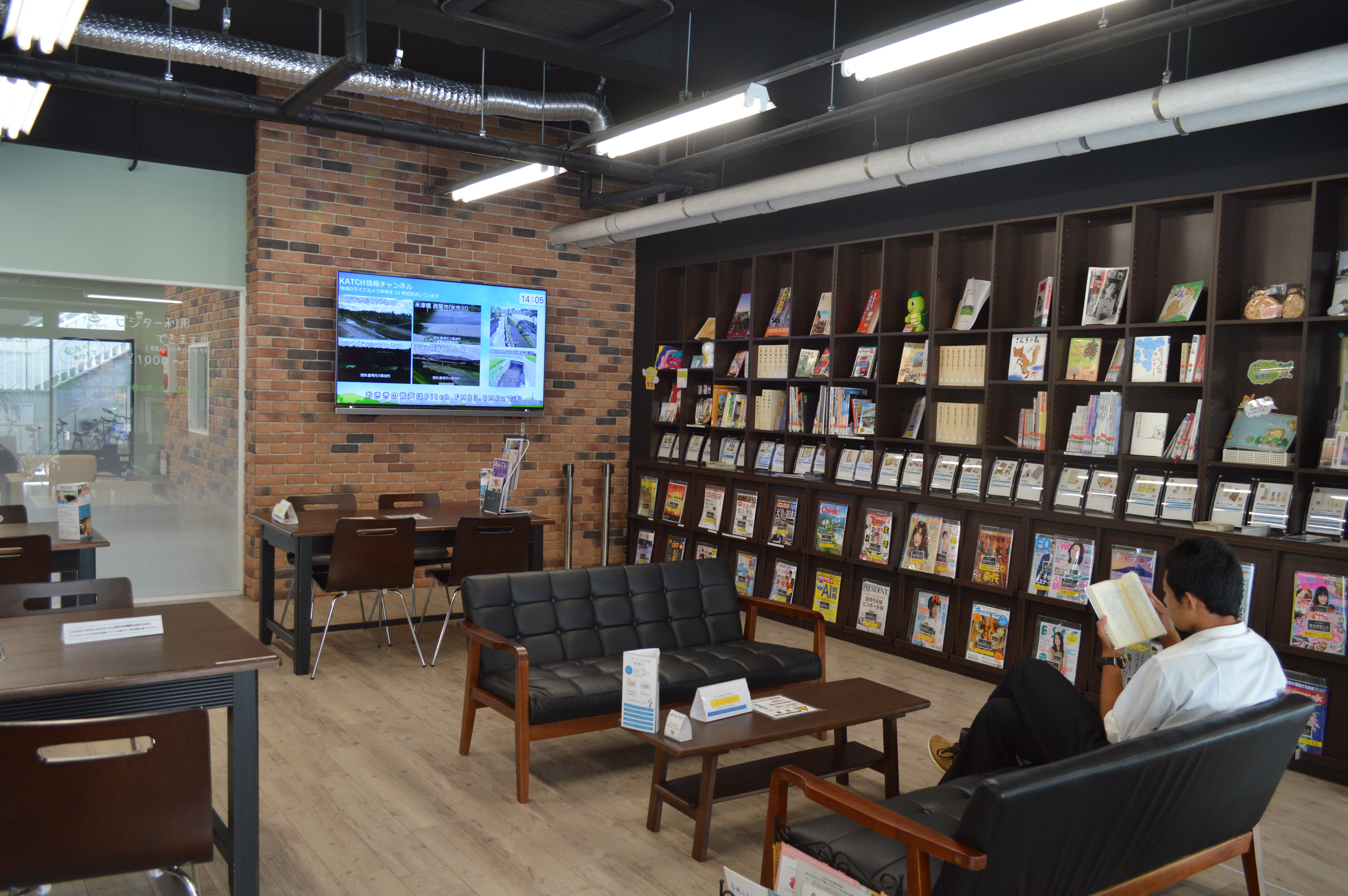 JR安城駅南口にある安城市観光案内所&コワーキングスペース「キーポート」（KEY PORT）。安城市図書館の一部機能も備えている。